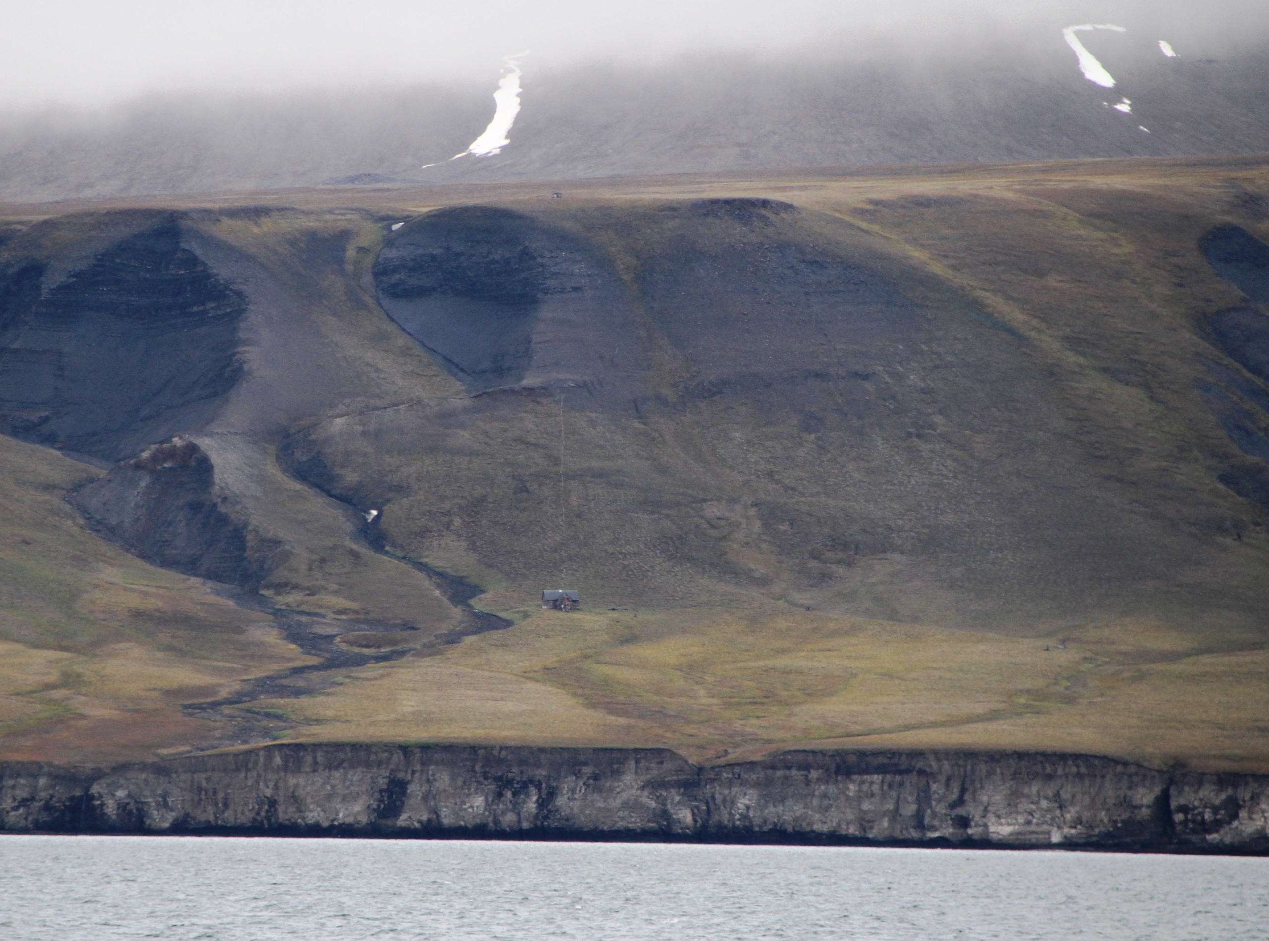 Svenskhuset, a swedish polar expedition camp from early 1870s, in Billefjorden, central Spitsbergen. Note the grave cross to the right.